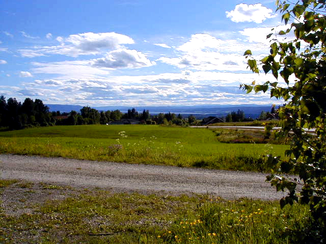 View from Haugsbygd towards Ringerike and Lake Tyrifjorden Photo: T.Bjornstad, 2002-10-24